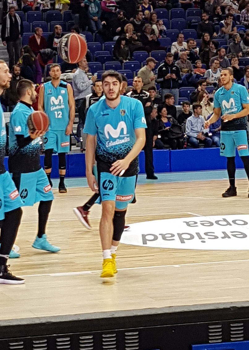 Calentamiento previo a un partido de ACB de Edgar Vicedo sobre el palacio de los deportes de Madrid